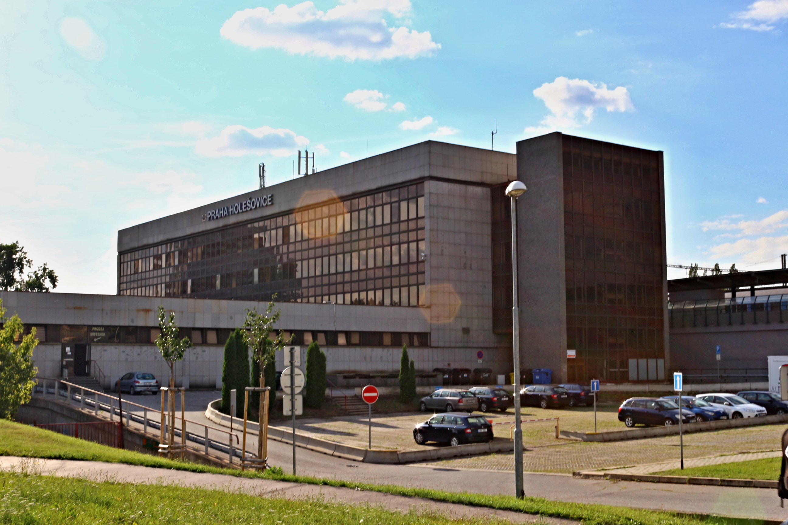 Nádraží Praha-Holešovice